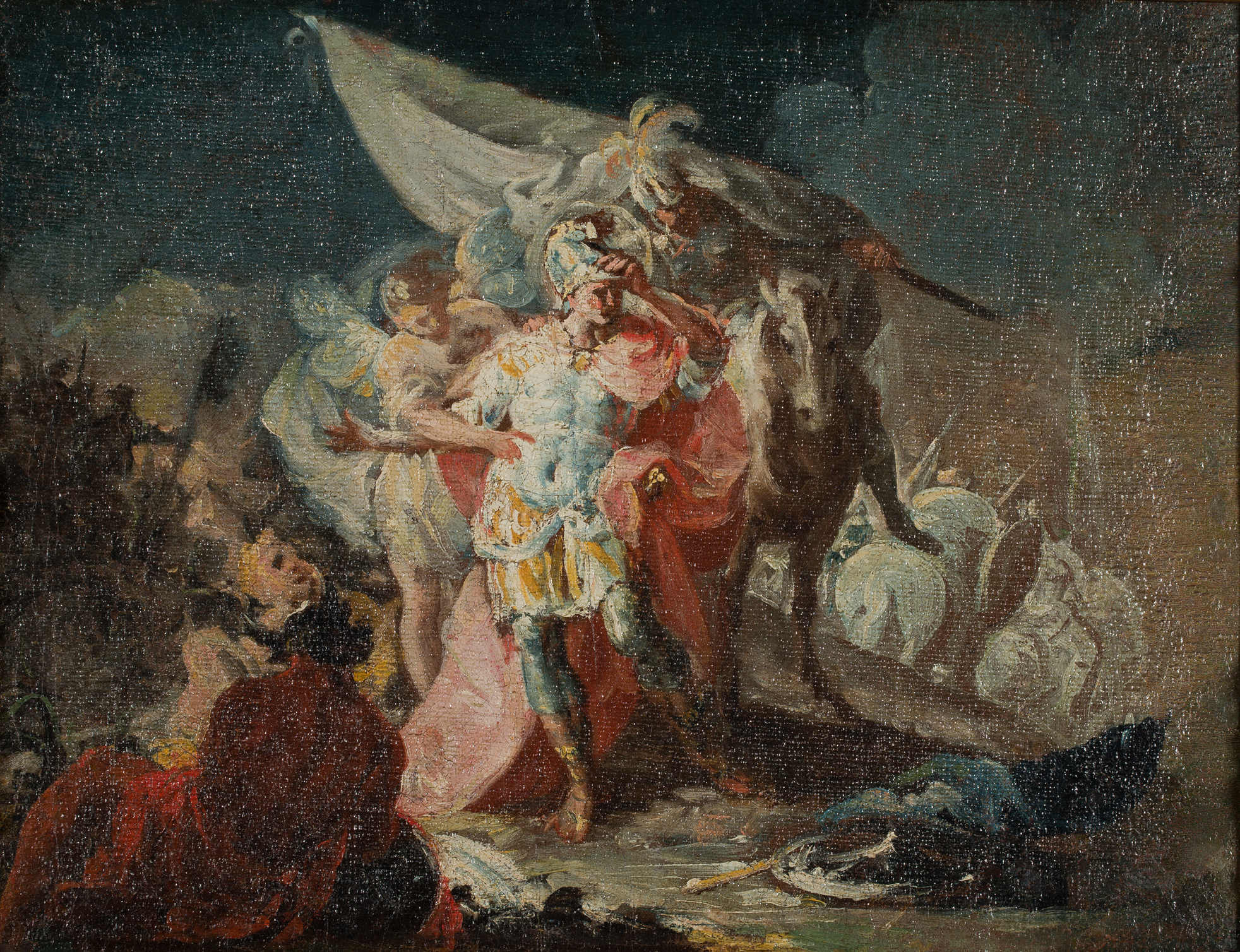 La obra representa al general y estadista cartaginés Aníbal (247-183 a.C.) cruzando los Alpes y divisando Italia.